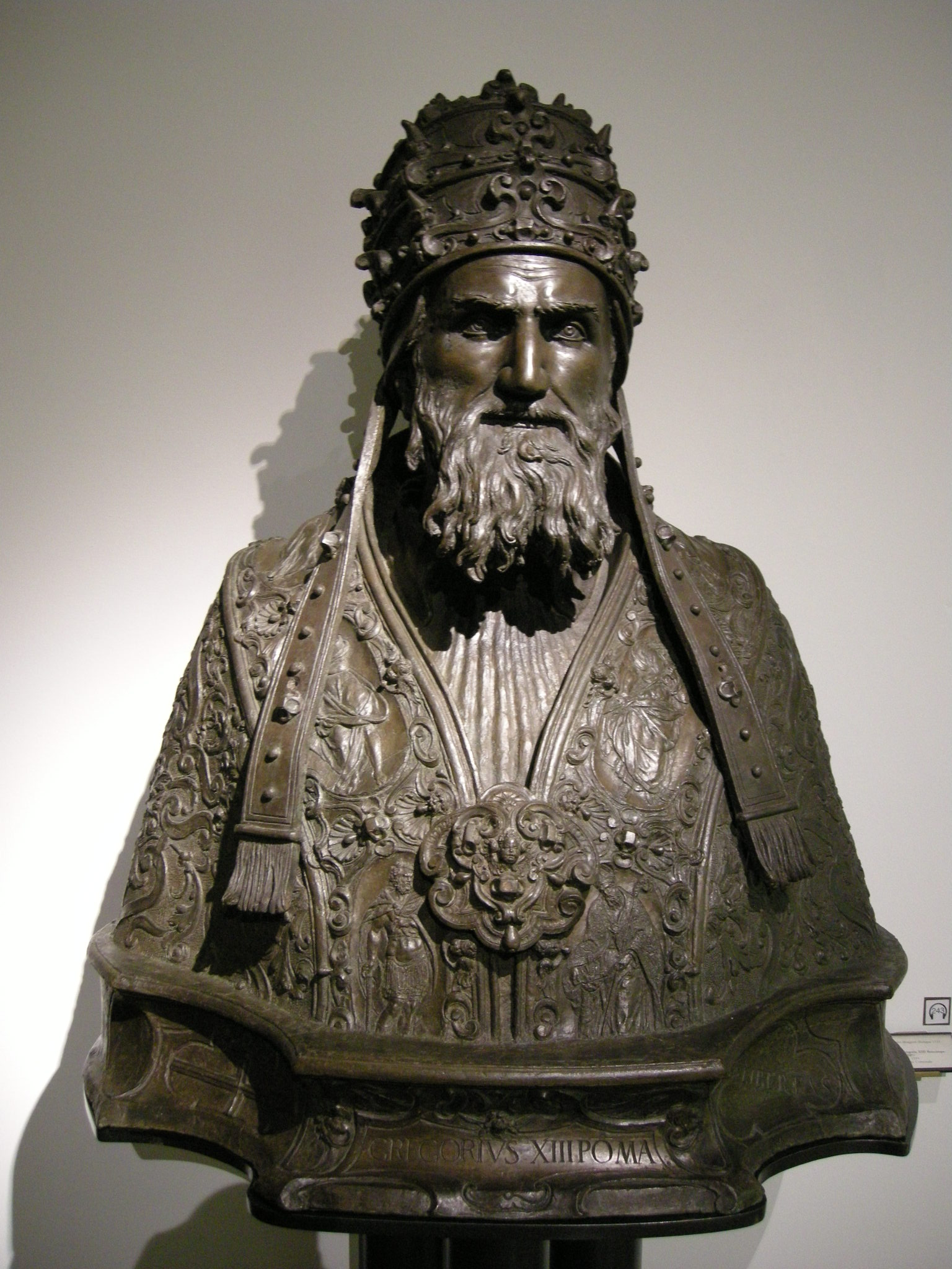 Alessandro Menganti, Busto di Gregorio XIII Boncompagni, nel Museo civico medievale a Bologna, inv. 1559.